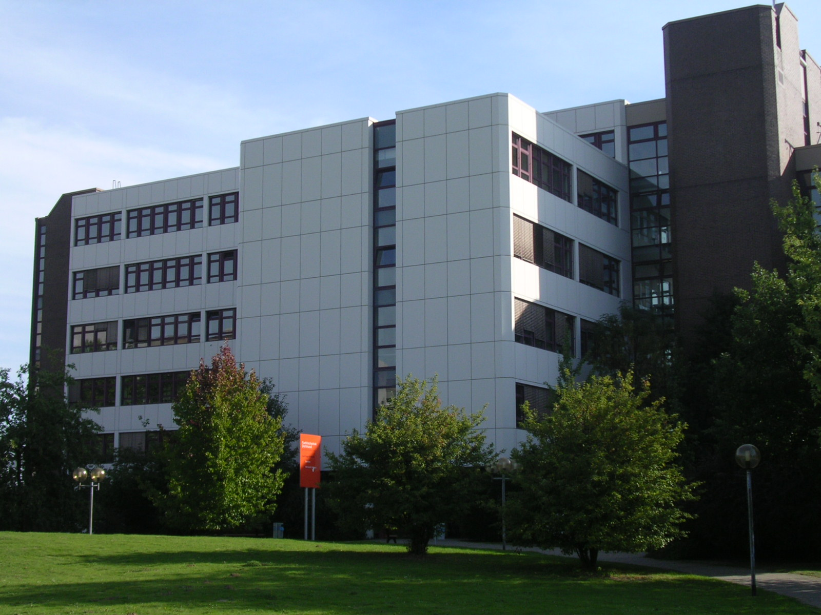 Gebäude der Fachhochschule Dortmund, Bereich Angewandte Sozialwissenschaften und Wirtschaft, samt Bereichsbibliothek SoWI